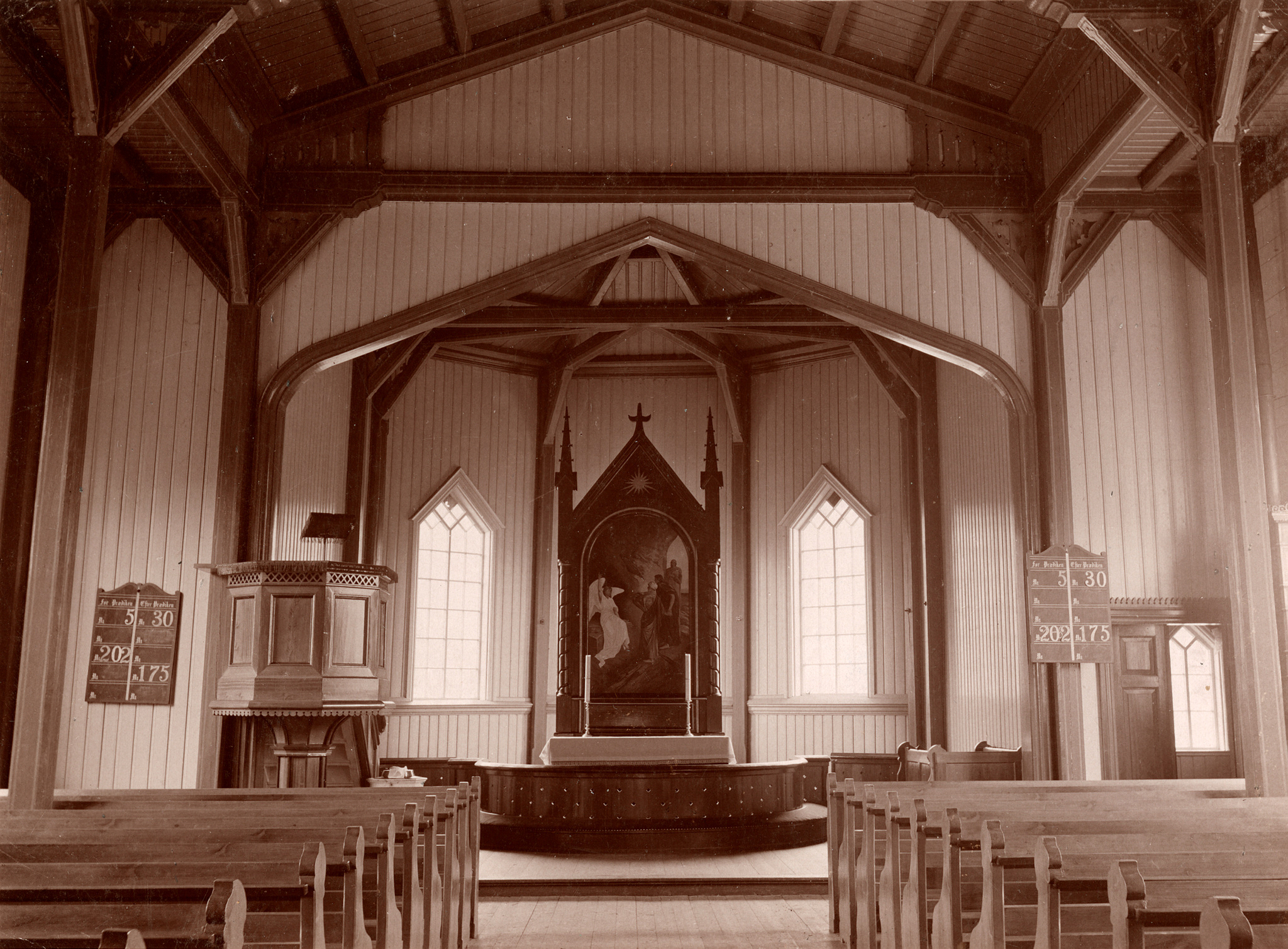 Interiør i Nore kirke. Foto: Christian Christensen Thomhav, fra Riksantikvarens Kulturminnebilder.